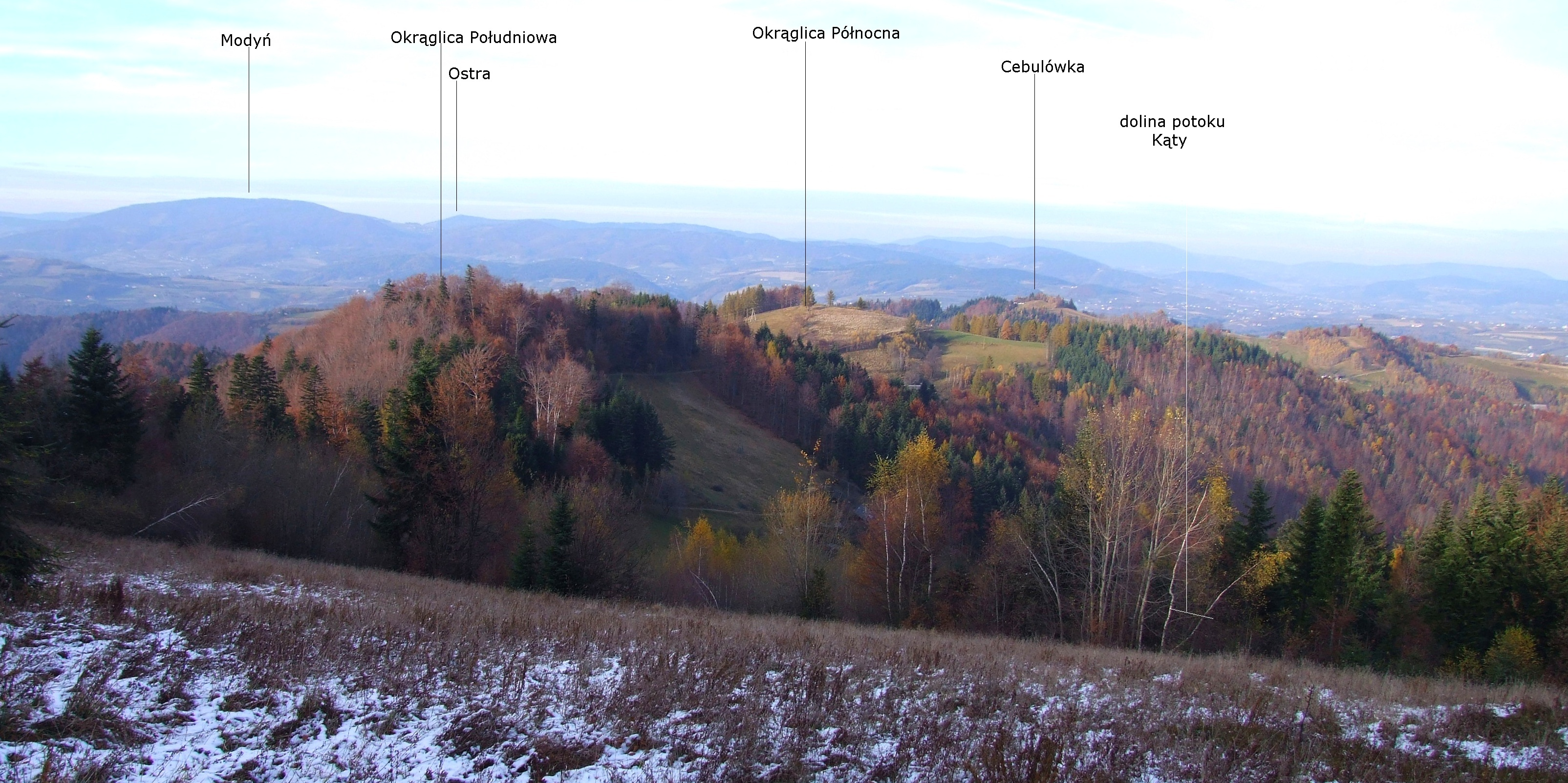 Widok z głównego grzbietu Pasma Radziejowej